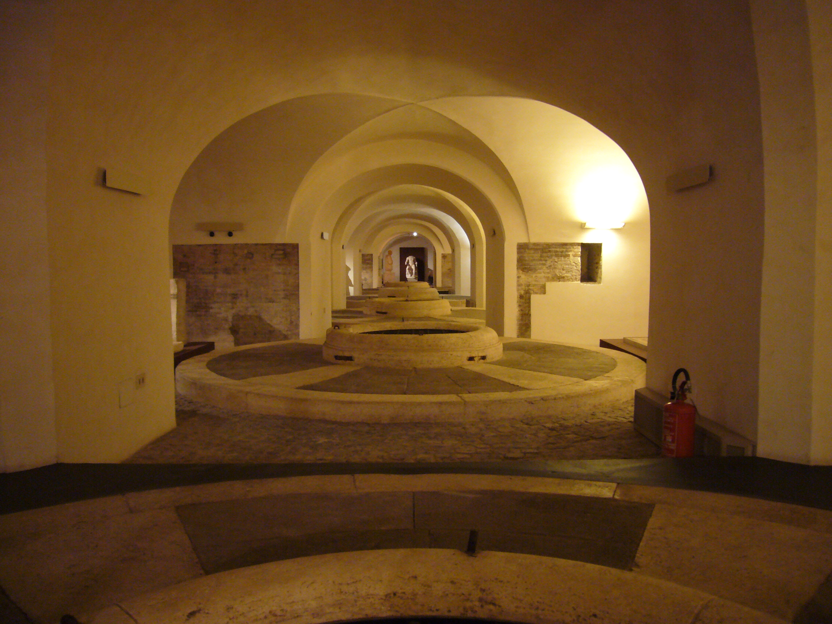 Roma, Olearie papali alle Terme di Diocleziano